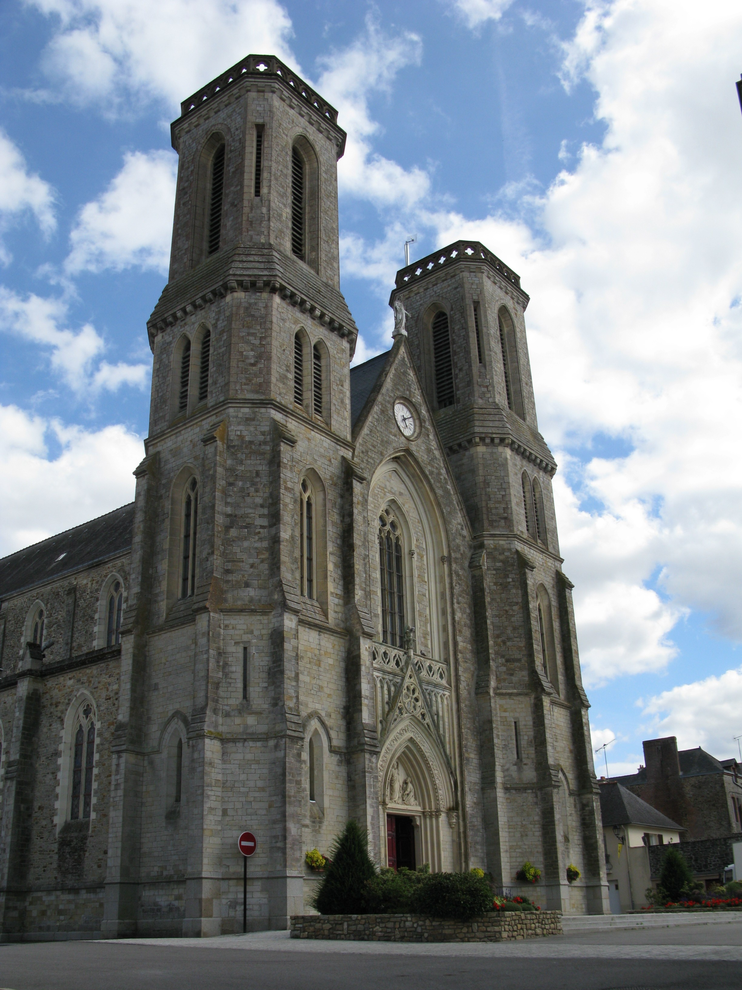 L'église de Martigné-Ferchaud